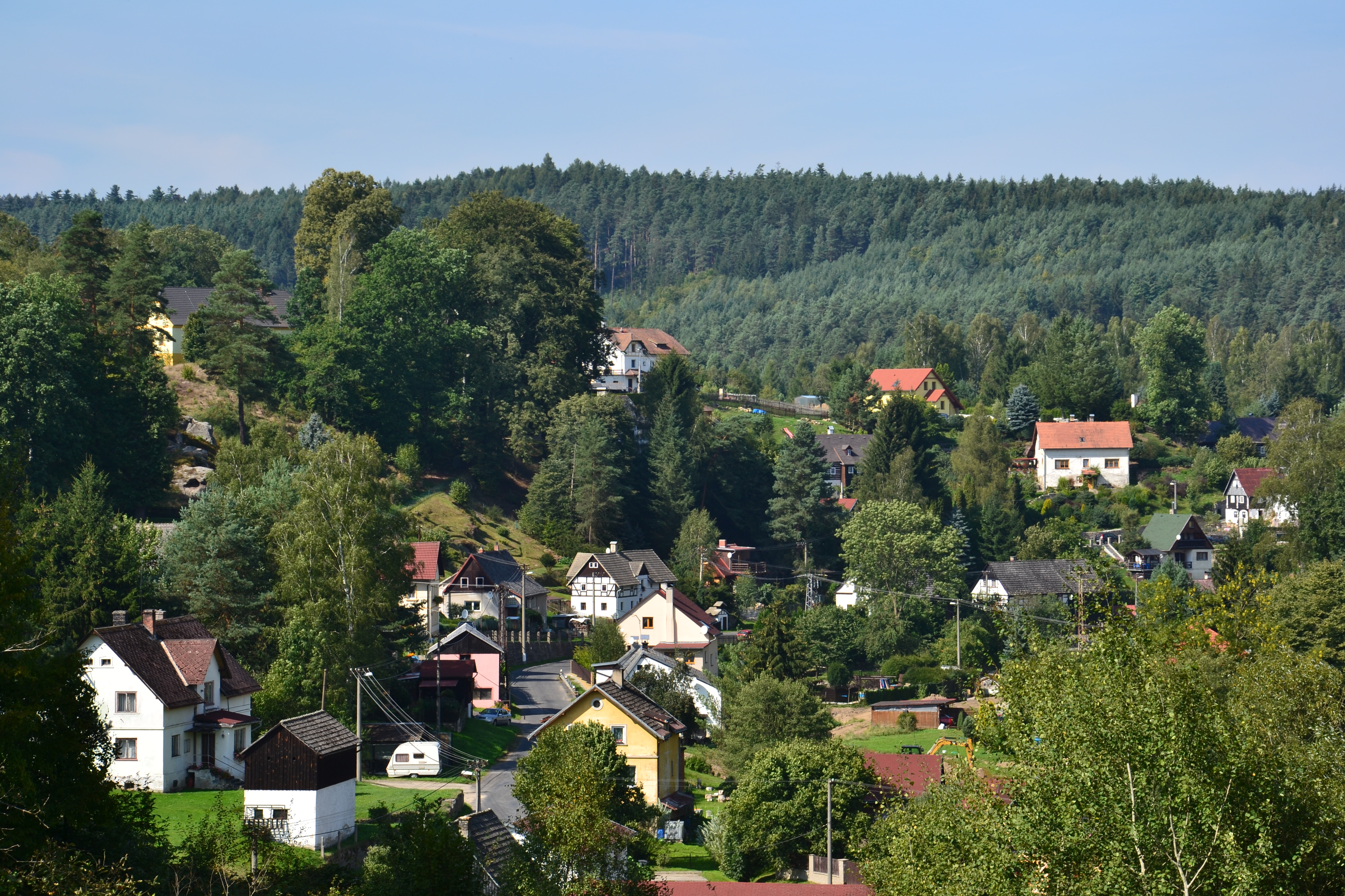 Celkový pohled od jihovýchodu